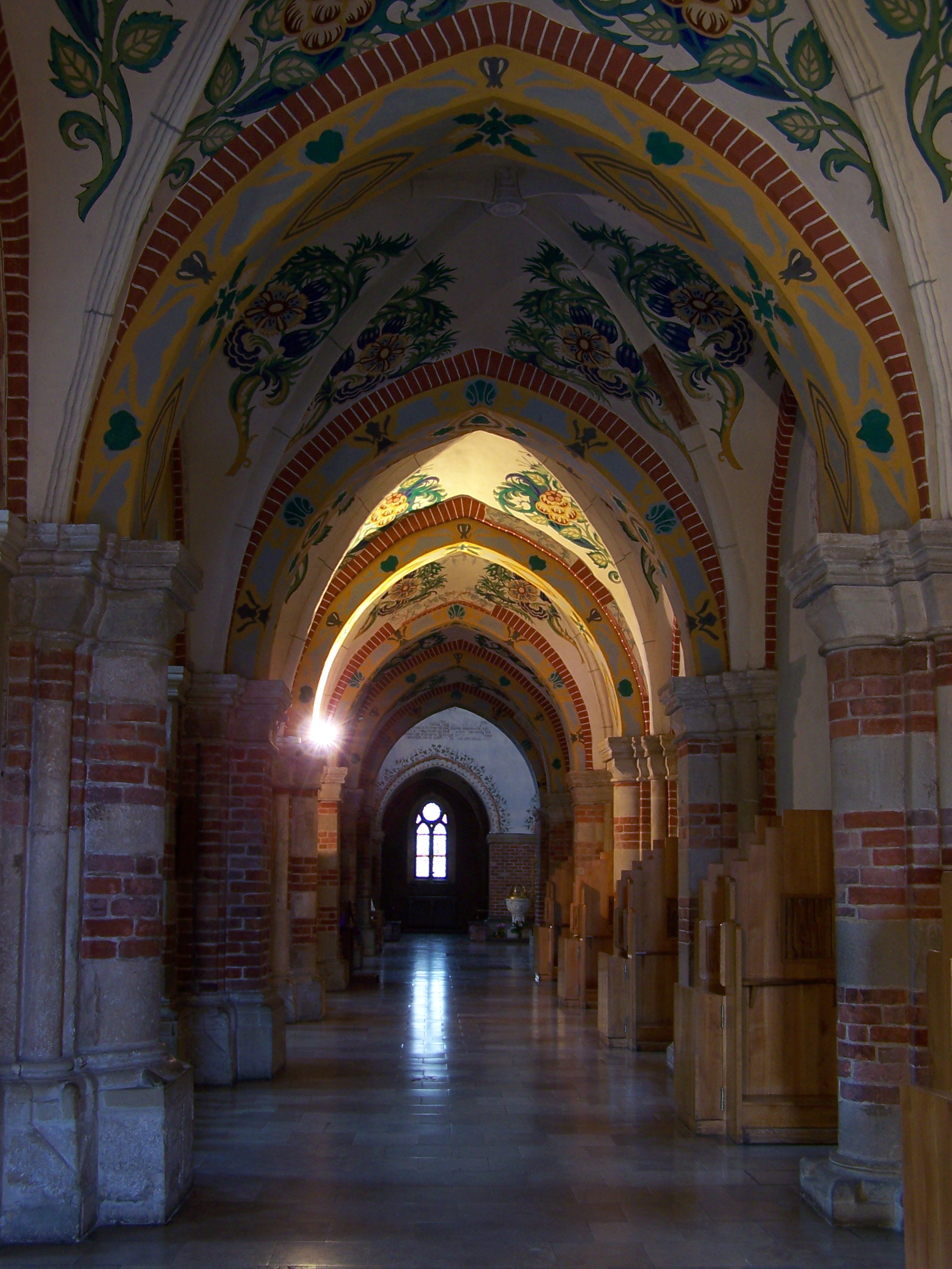 Nawa boczna w kościele klasztornym w Mogile (dzielnica Krakowa).